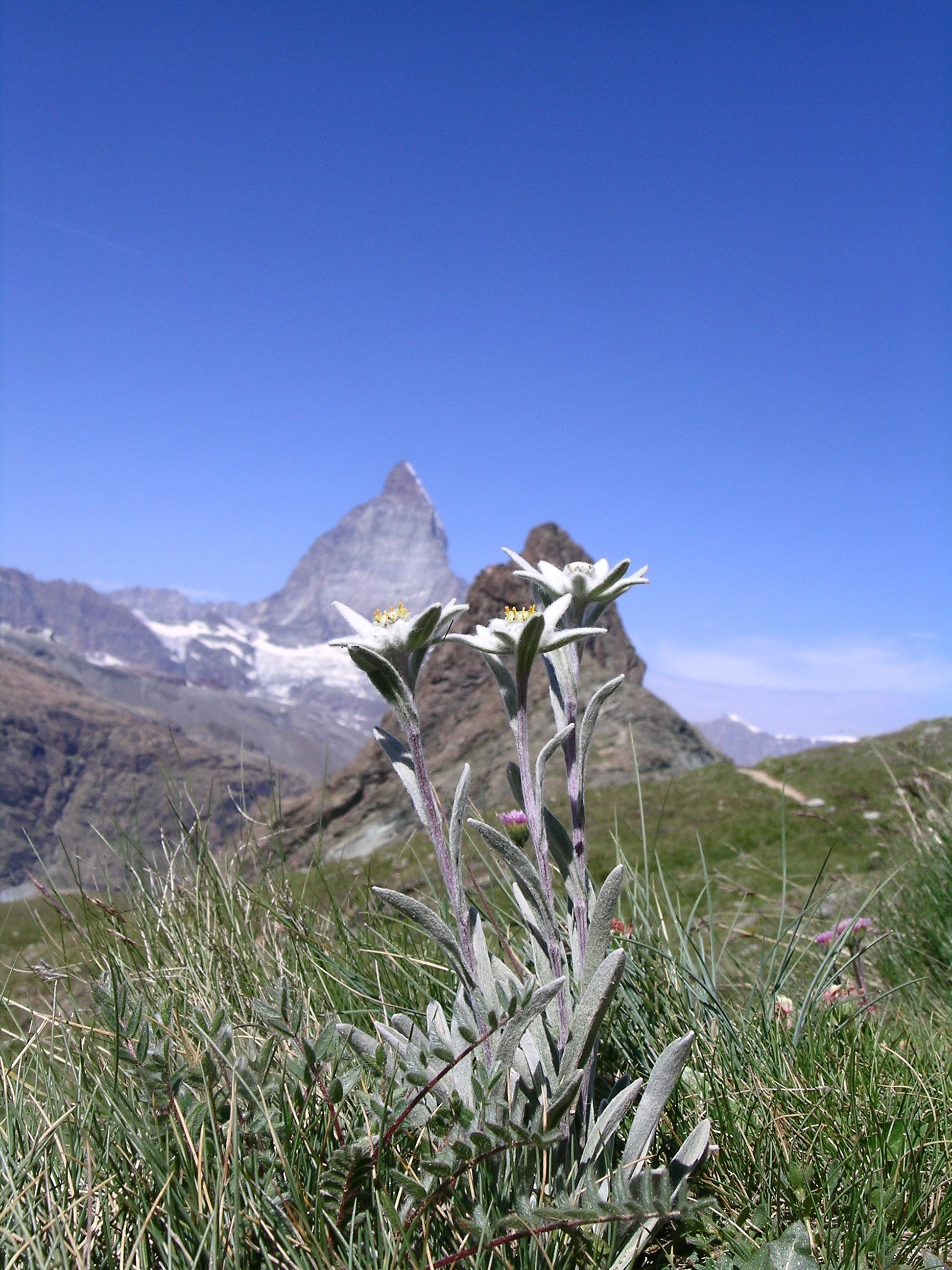 Leontopodium alpinum, Zermatt (2550 m.a.s), Kanton Wallis, Schweiz